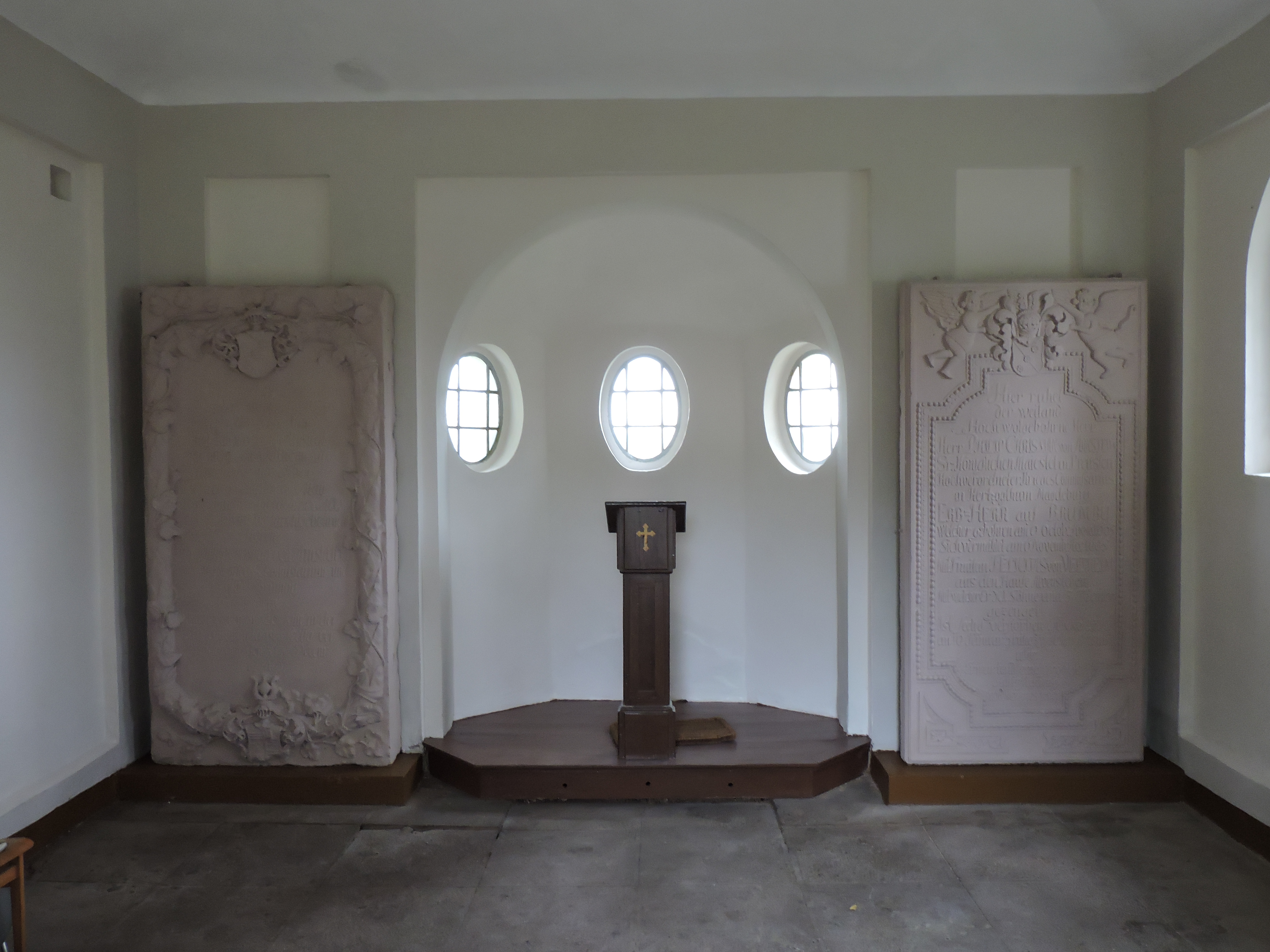 Kapelle Brumby Nordgermersleben